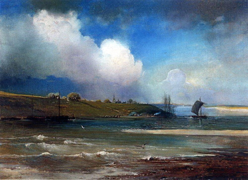 А.К. Саврасов - Вид Волги под Юрьевцем